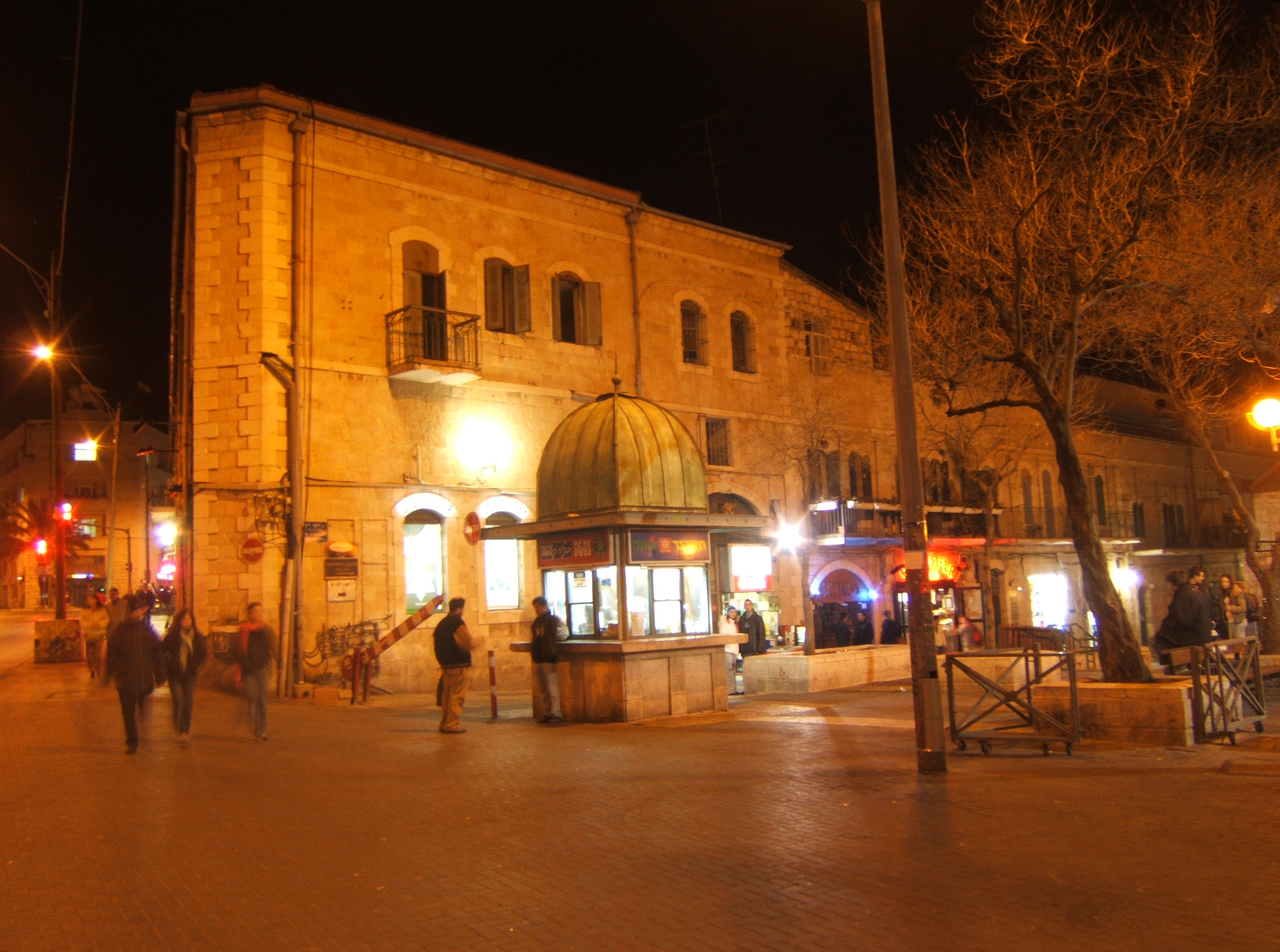 31 Jaffa Road, Jerusalem